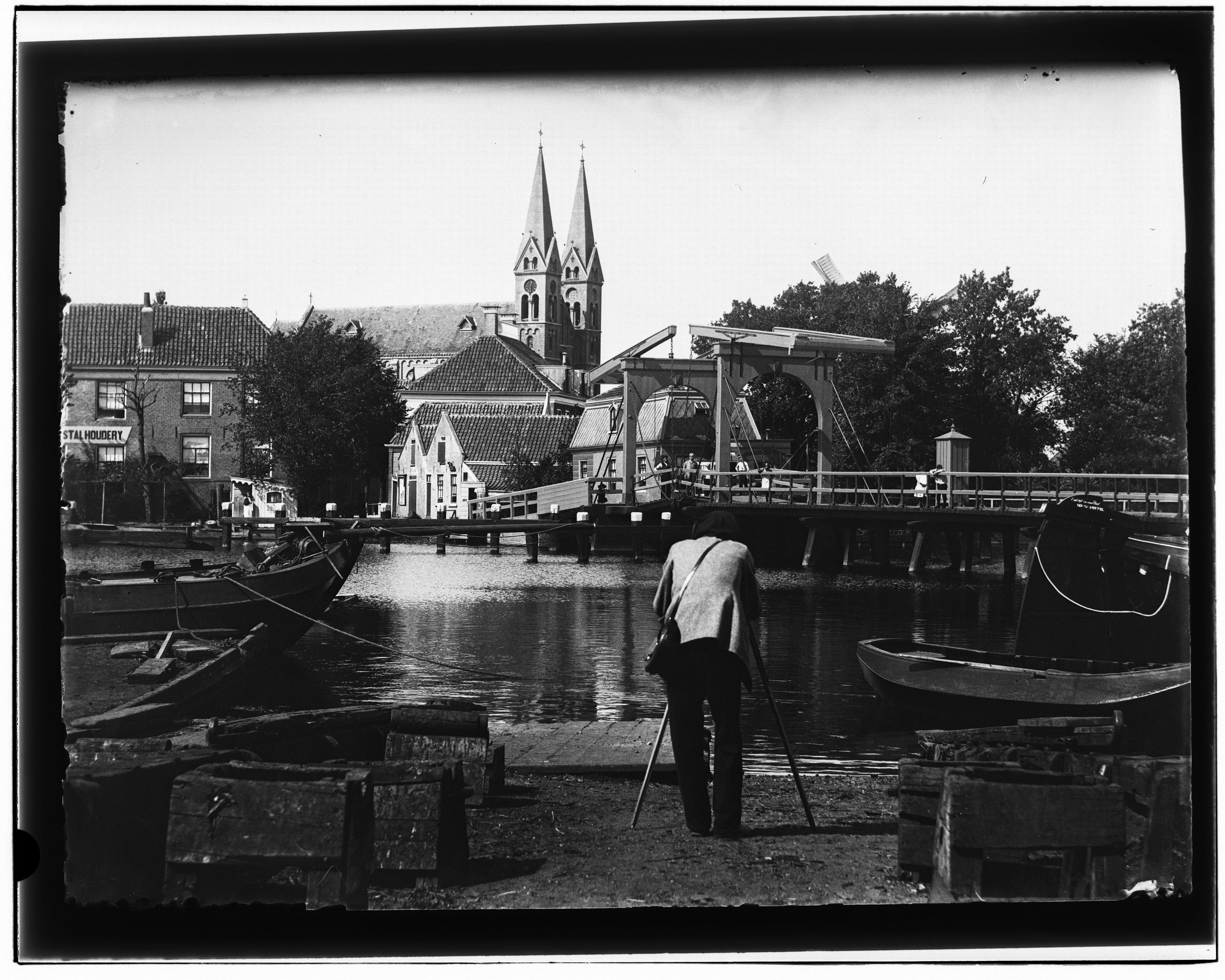 Beschrijving Uithoorn Gezien naar ophaalbrug over de Amstel. Op de voorgrond een man``, op de rug gezien``, met camera op statief en zijn hoofd onder een zwarte doek. Documenttype foto Vervaardiger Olie``, Jacob (1834-1905) Collectie Collectie Jacob Olie Jbz. Datering 2 september 1895 Inventarissen Afbeeldingsbestand 10019A001446 Generated with Dememorixer